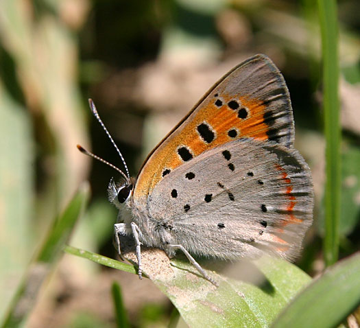 Lycaena phlaeas